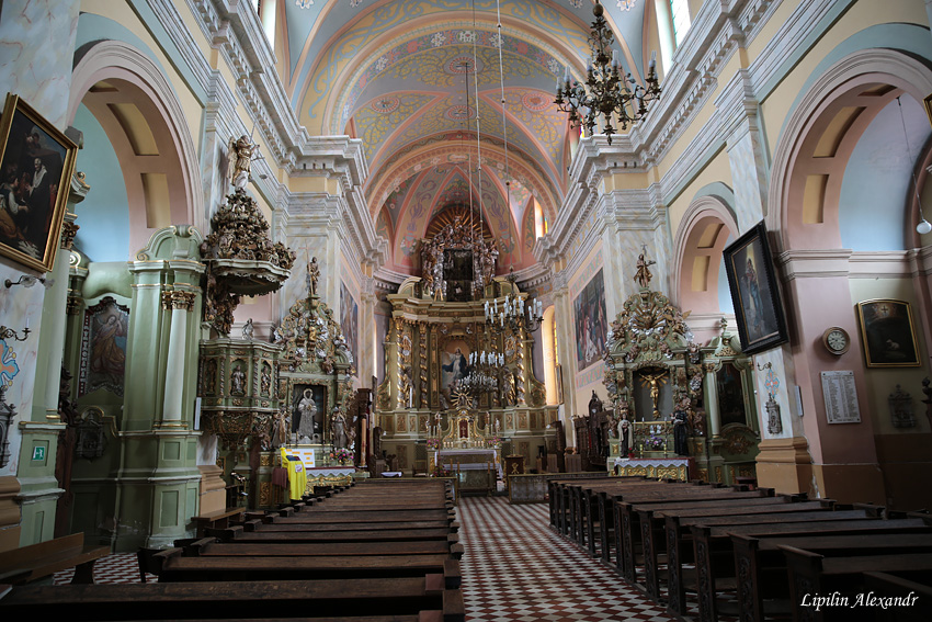 Пінск. Францысканскі касцёл. Інтэр'ер